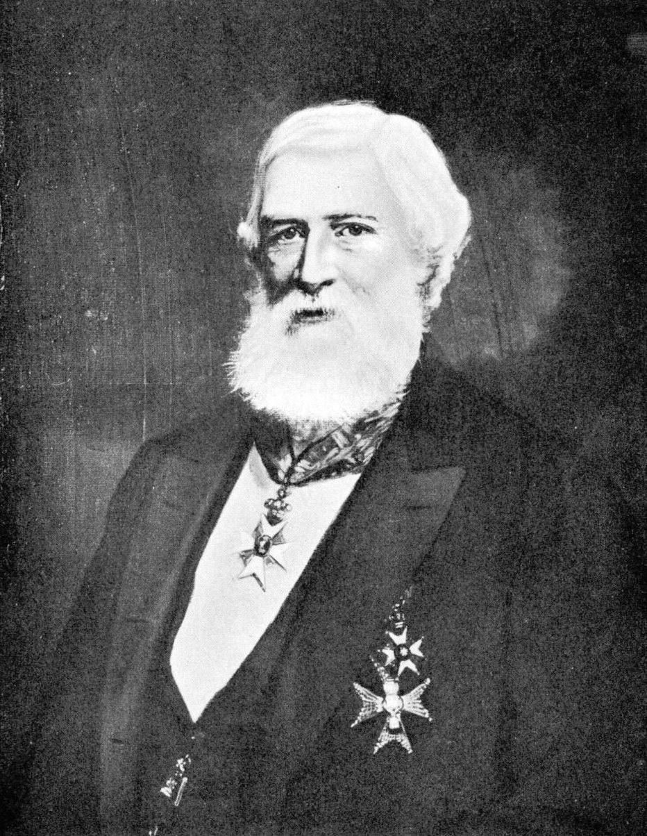 Peter Hammarberg (1814–1888). Svart frack med ordenstecken, brun fond.